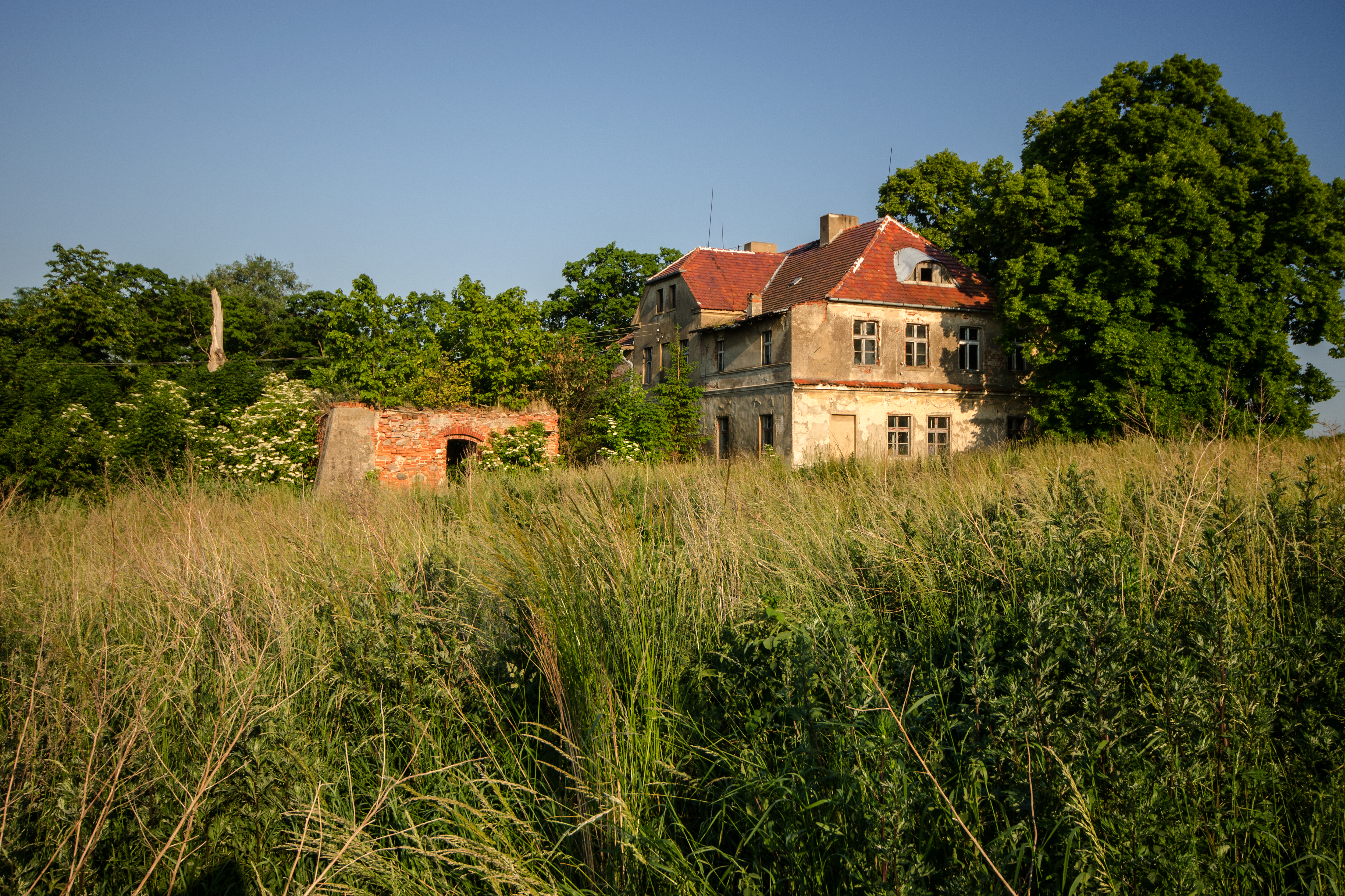 Rudna Mała 23, pałac, XX